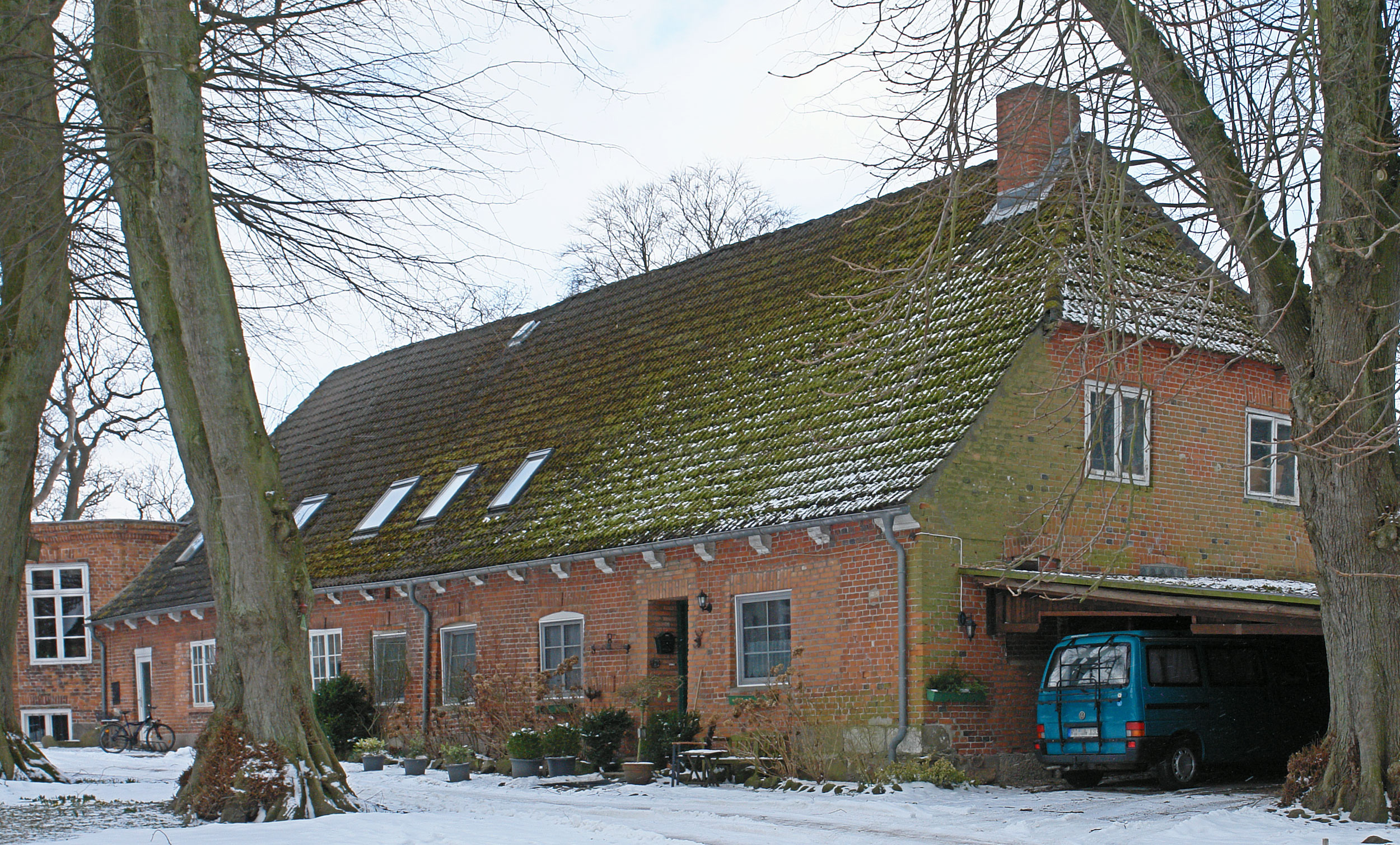 Gut Eckhof, Dänischenhagener Straße: Wirtschaftsgebäude Nordseite (Meiereiflügel)